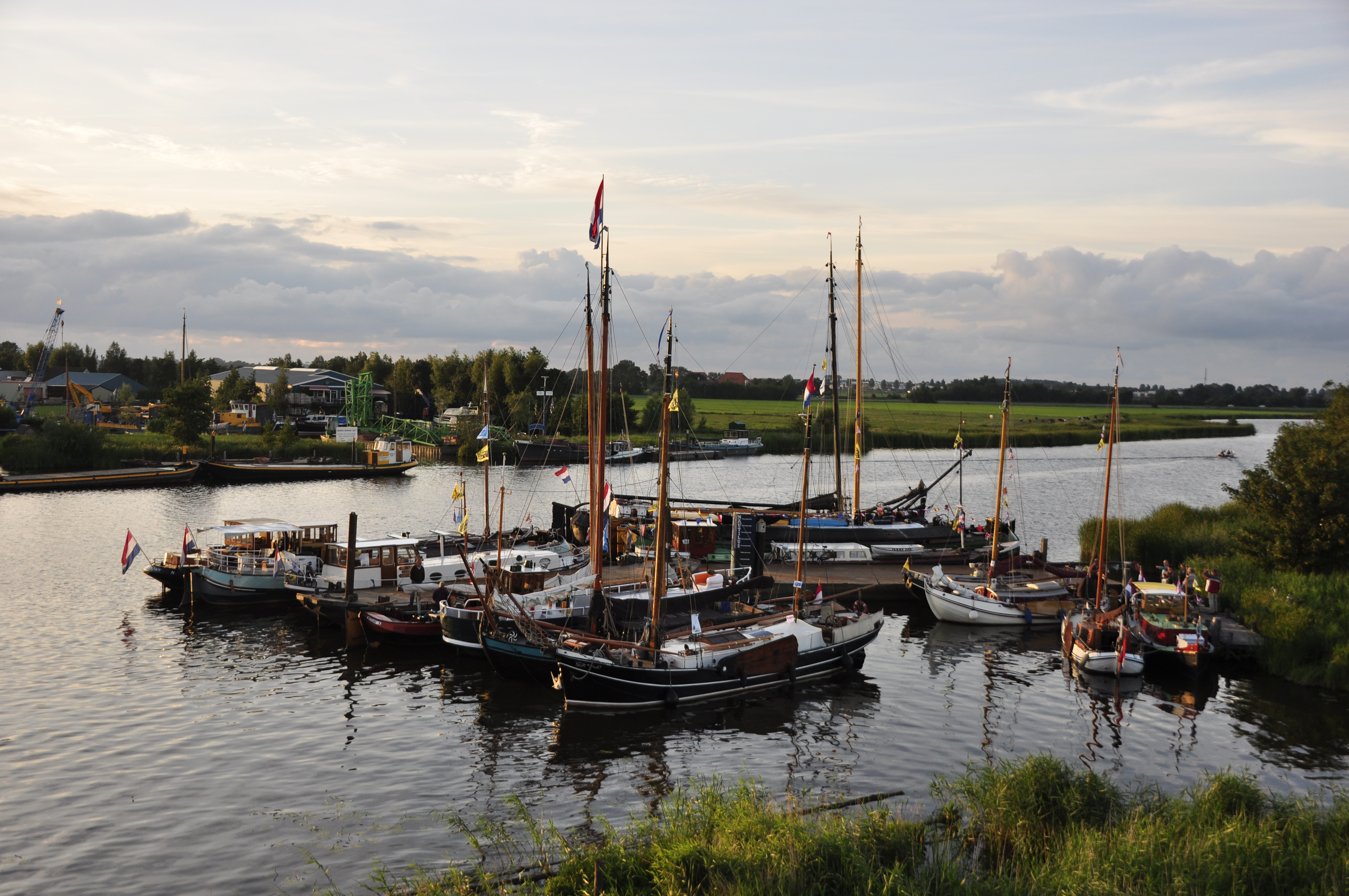 "De Boat Giet Oan!" in IJlst